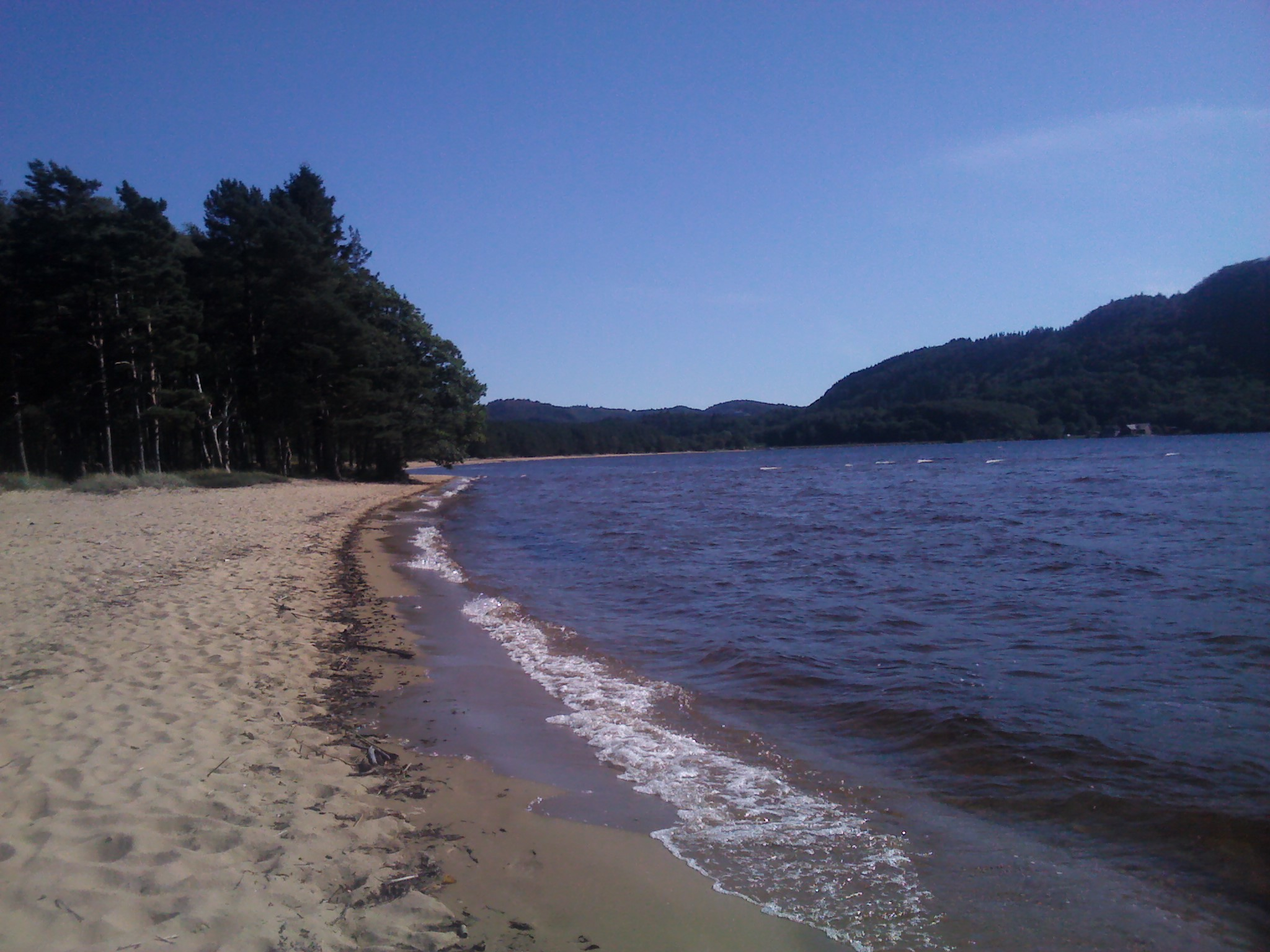 Kvaviksanden innerst i Lyngdalsfjorden